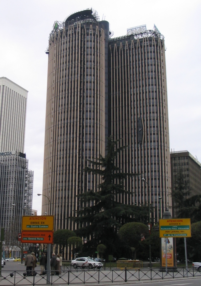 Torre Europa (Madrid), España.